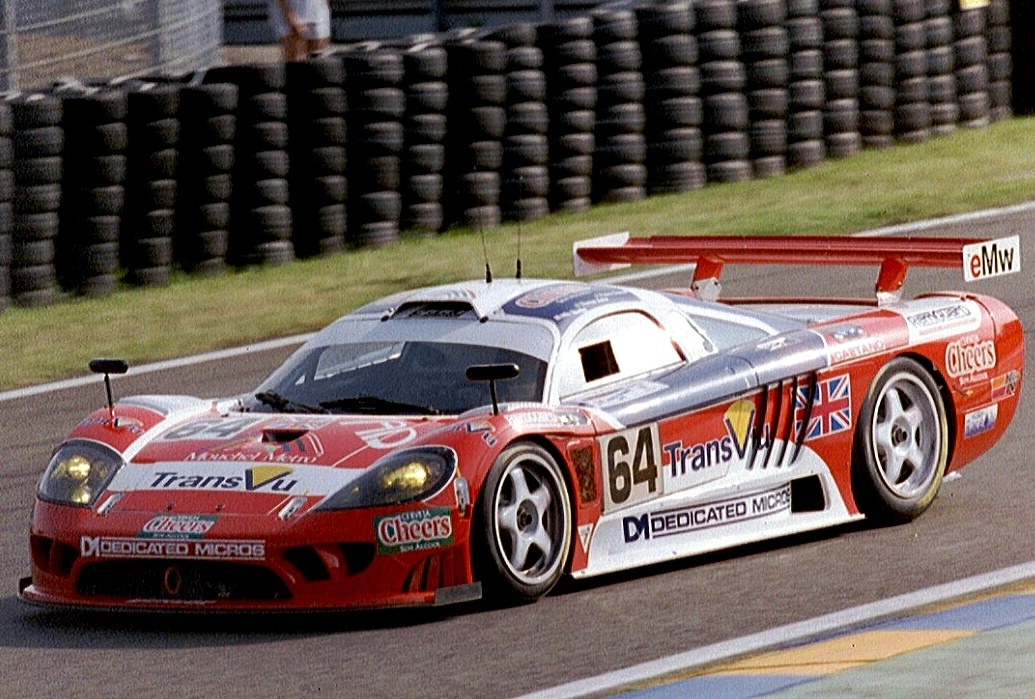 Saleen S7-R, driven by Thomas Erdos, Pedro Chaves & Mike Newton from Graham Nash Motorsport approaches Dunlop Bridge at the 2003 24 Hours of Le Mans